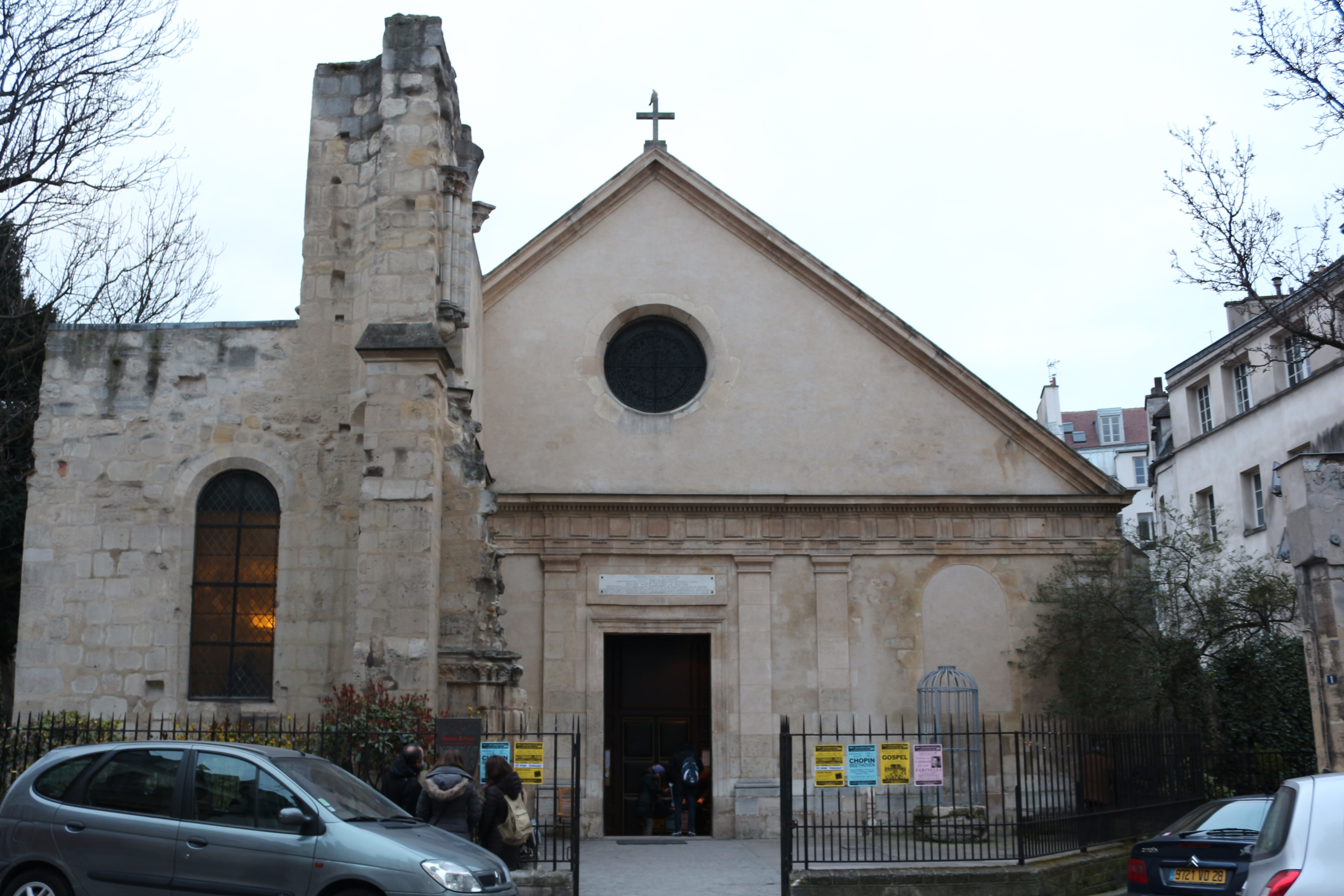 Frontansicht der romanischen Kirche St-Julien-le-Pauvre an der Rive Gauche in Paris (März 2015)